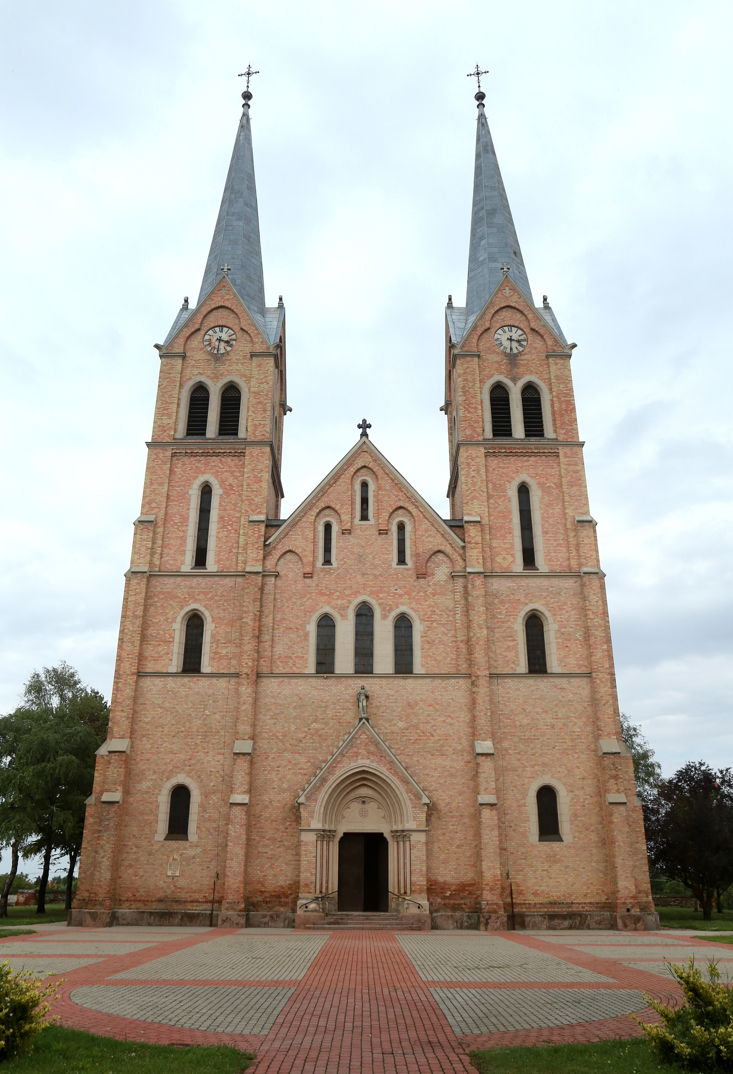 Törökszentmiklós, Szentháromság templom, épült 1898-1913 között, Aigner Sándor tervei szerint